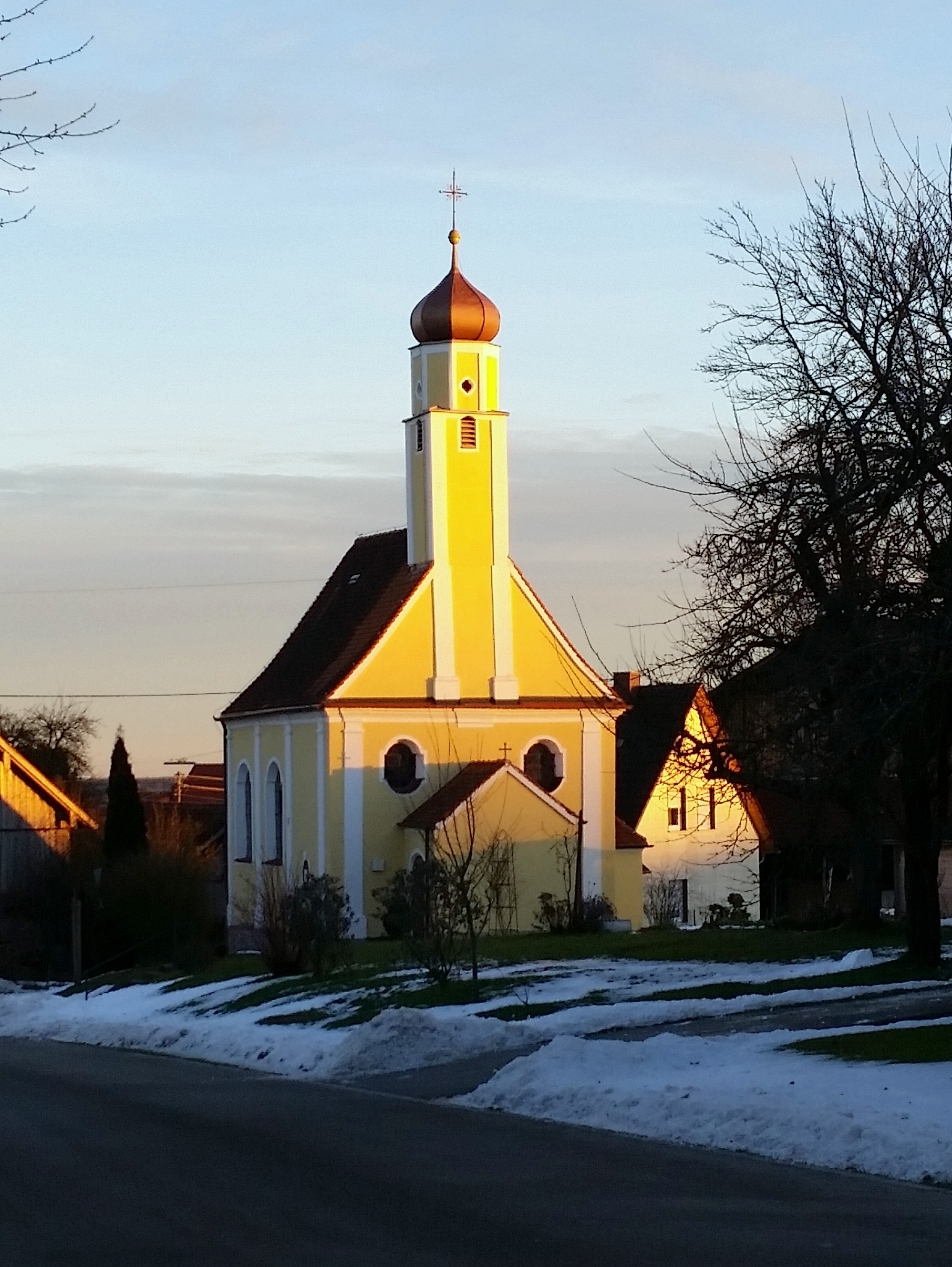 St. Wendelin, Traunried, Gemeinde Ettringen (Wertach)